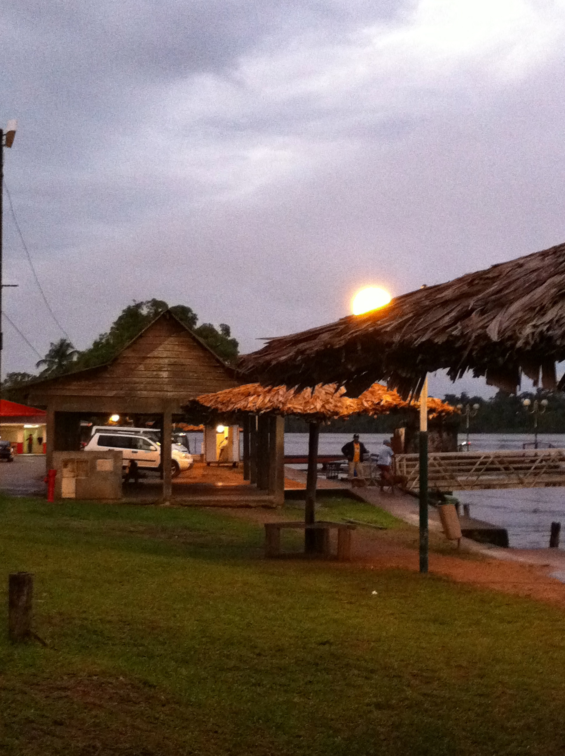 décembre 2011